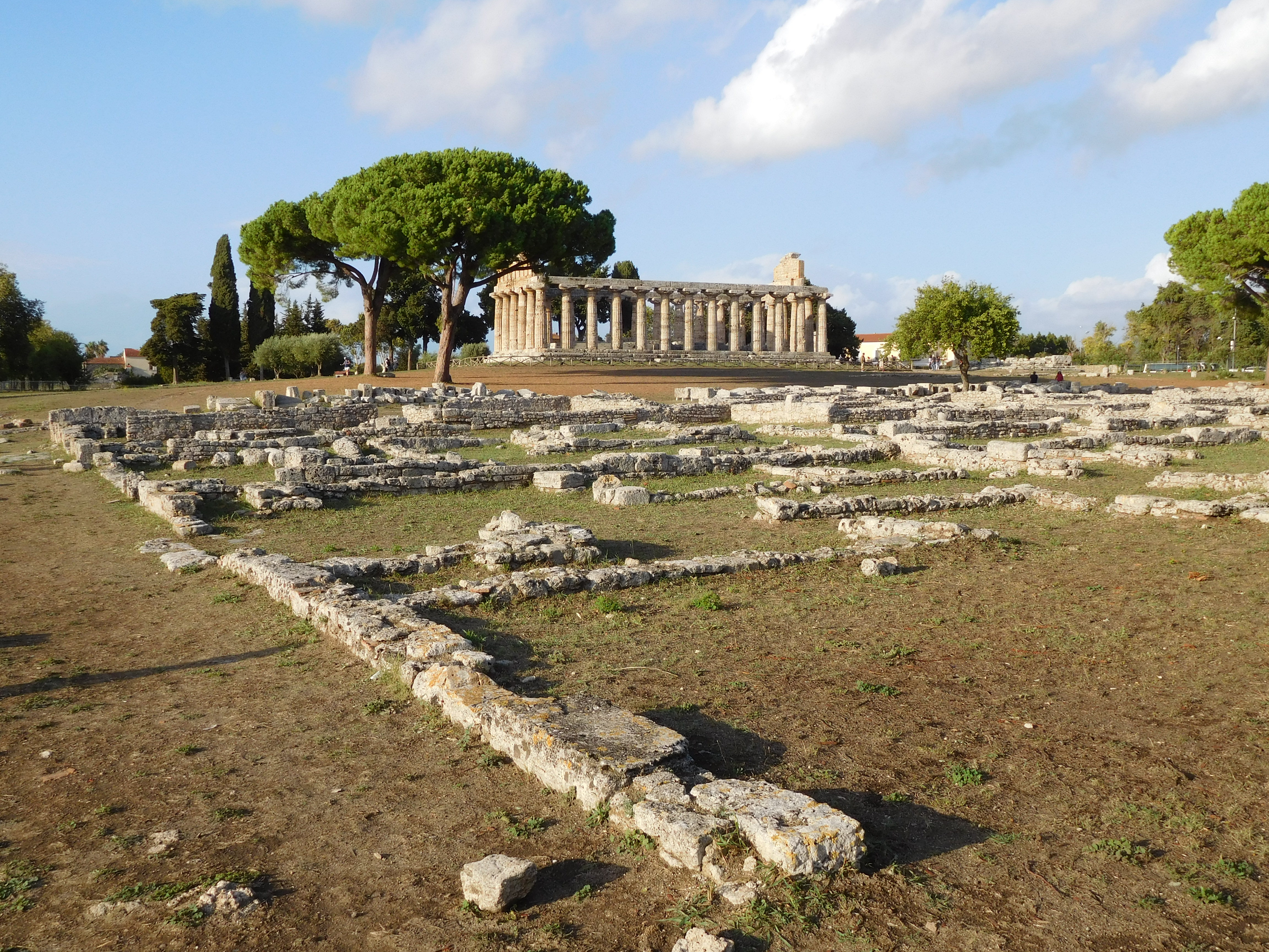 Parco archeologico di Paestum